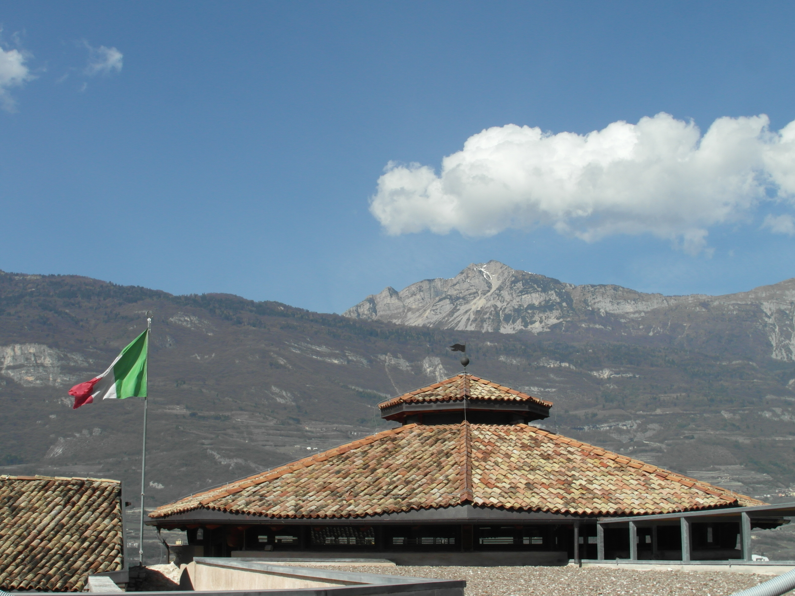 Castello di Rovereto - Torre esterna